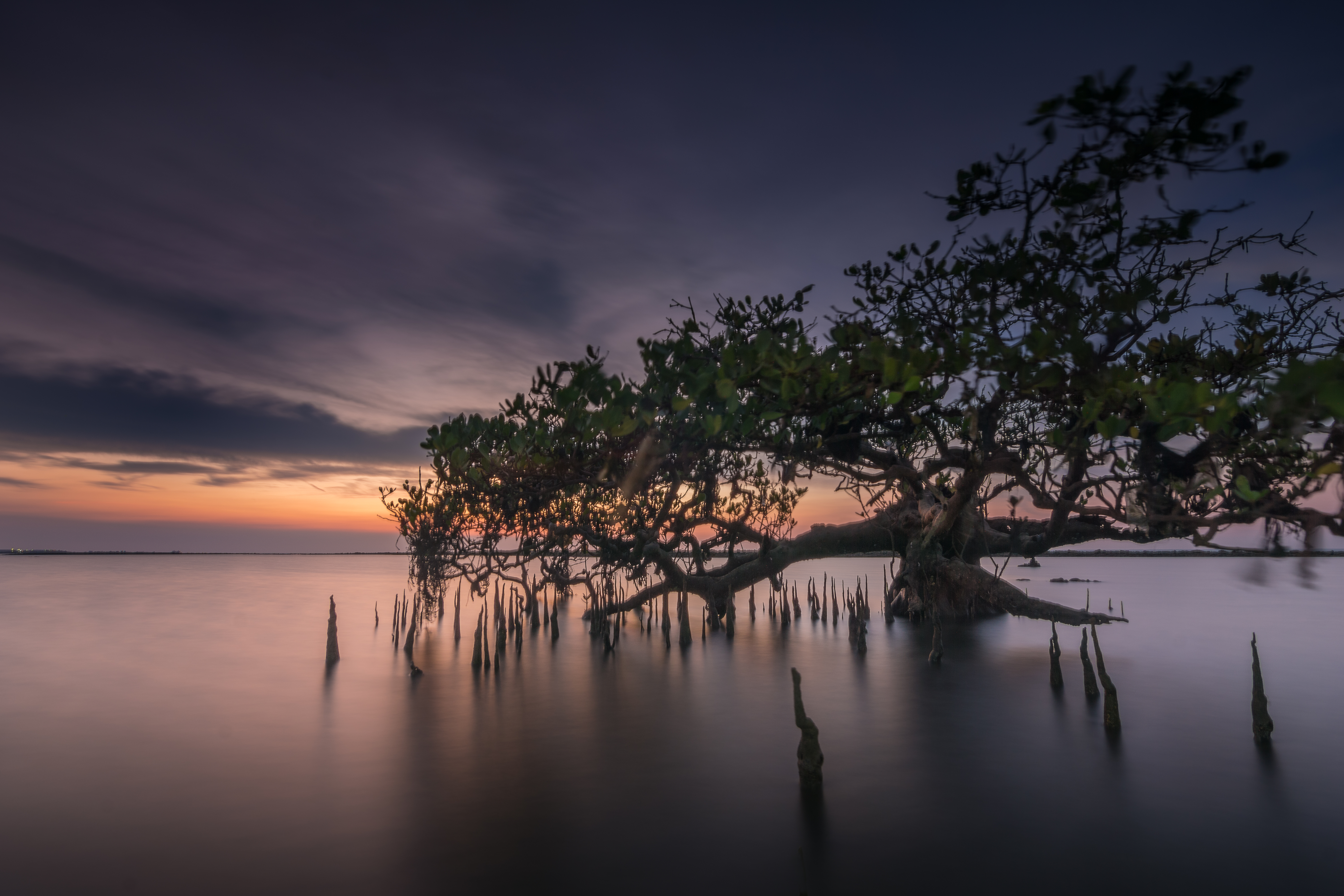 salah satu pohon bakau yang ada di pesisir paciran lamongan jawa timur